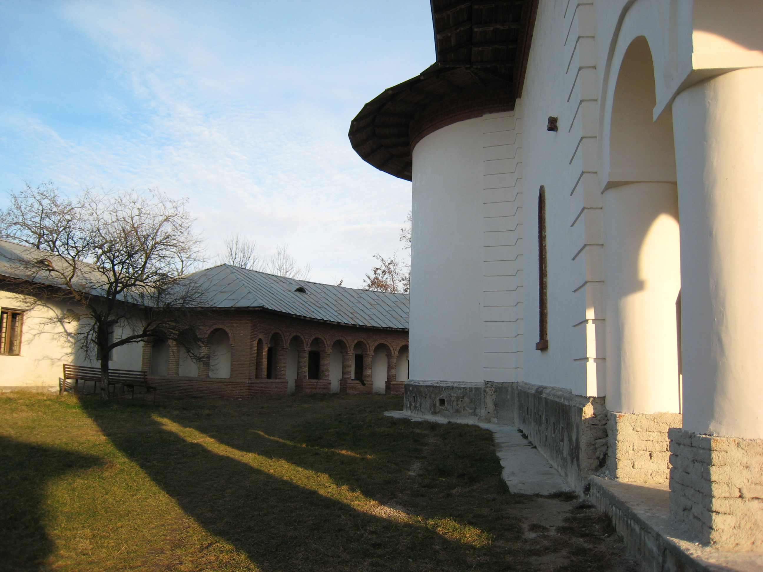 Peretele nordic al bisericii mănăstirii Glavacioc - februarie 2007 05